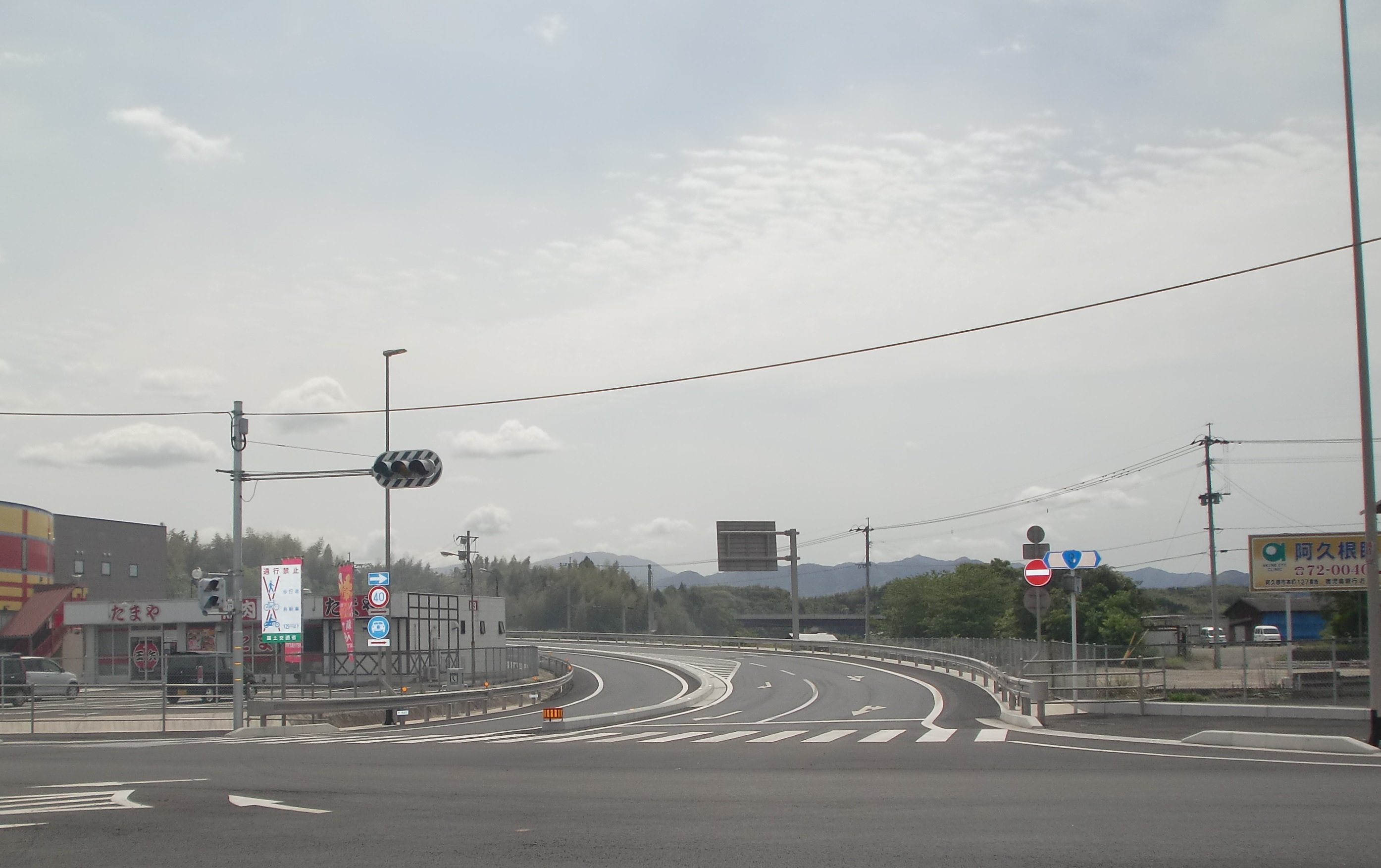 南九州西回り自動車道阿久根北インターチェンジの出入口（多田交差点）。